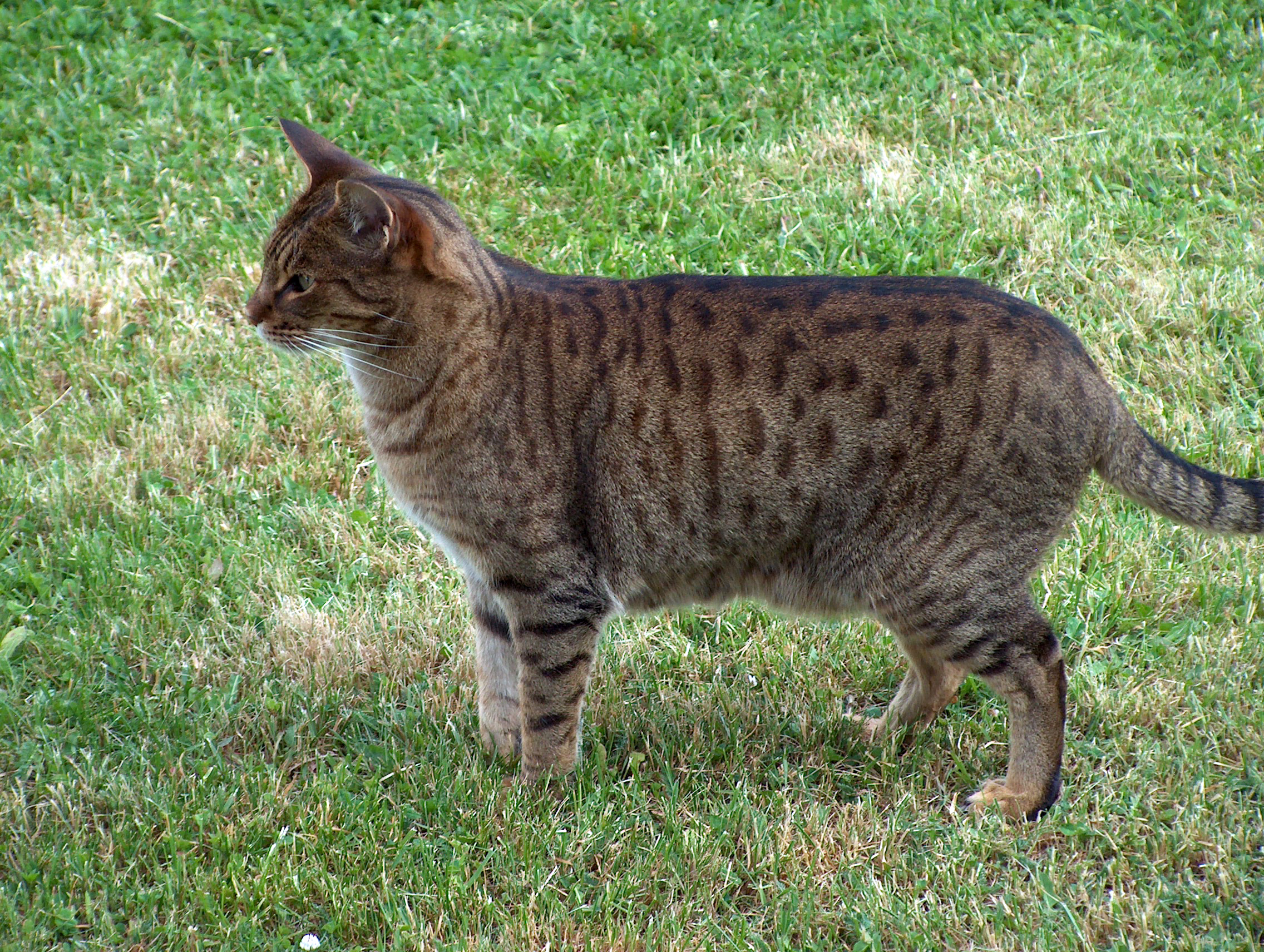 Ocicat (male)